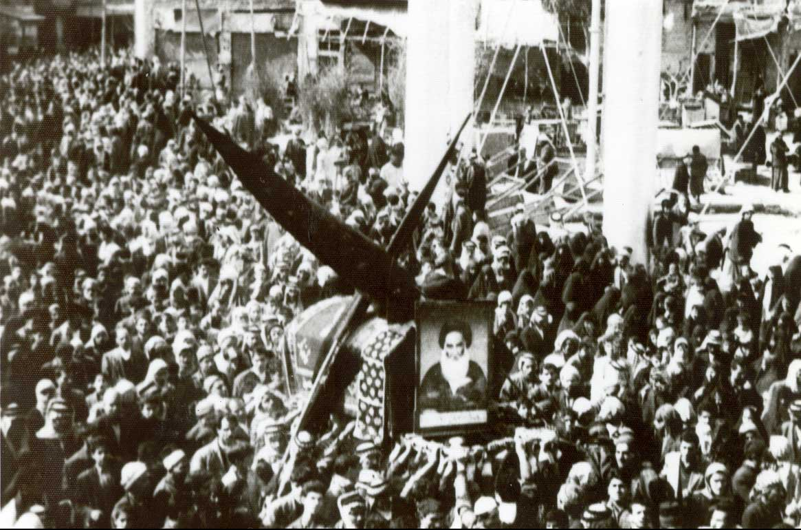 مراسم تشييع ميرزا مهدى شيرازى در كربلا